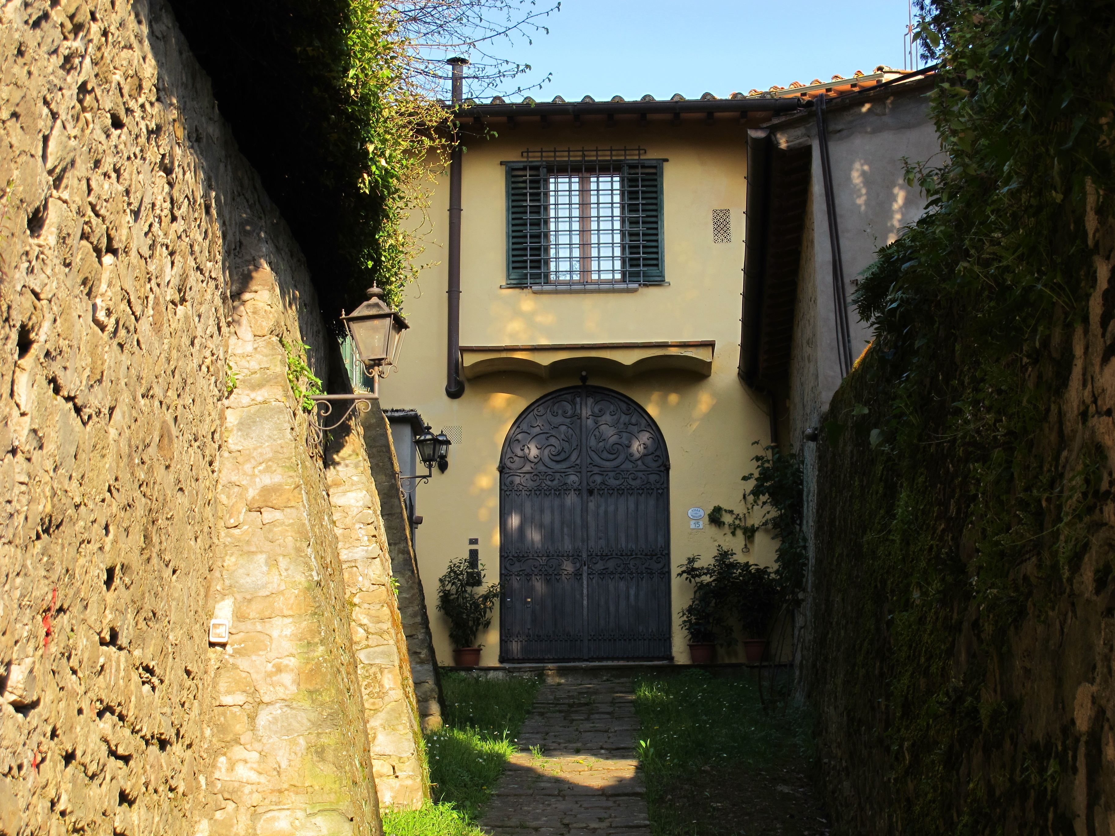 Villa papiniano, ext